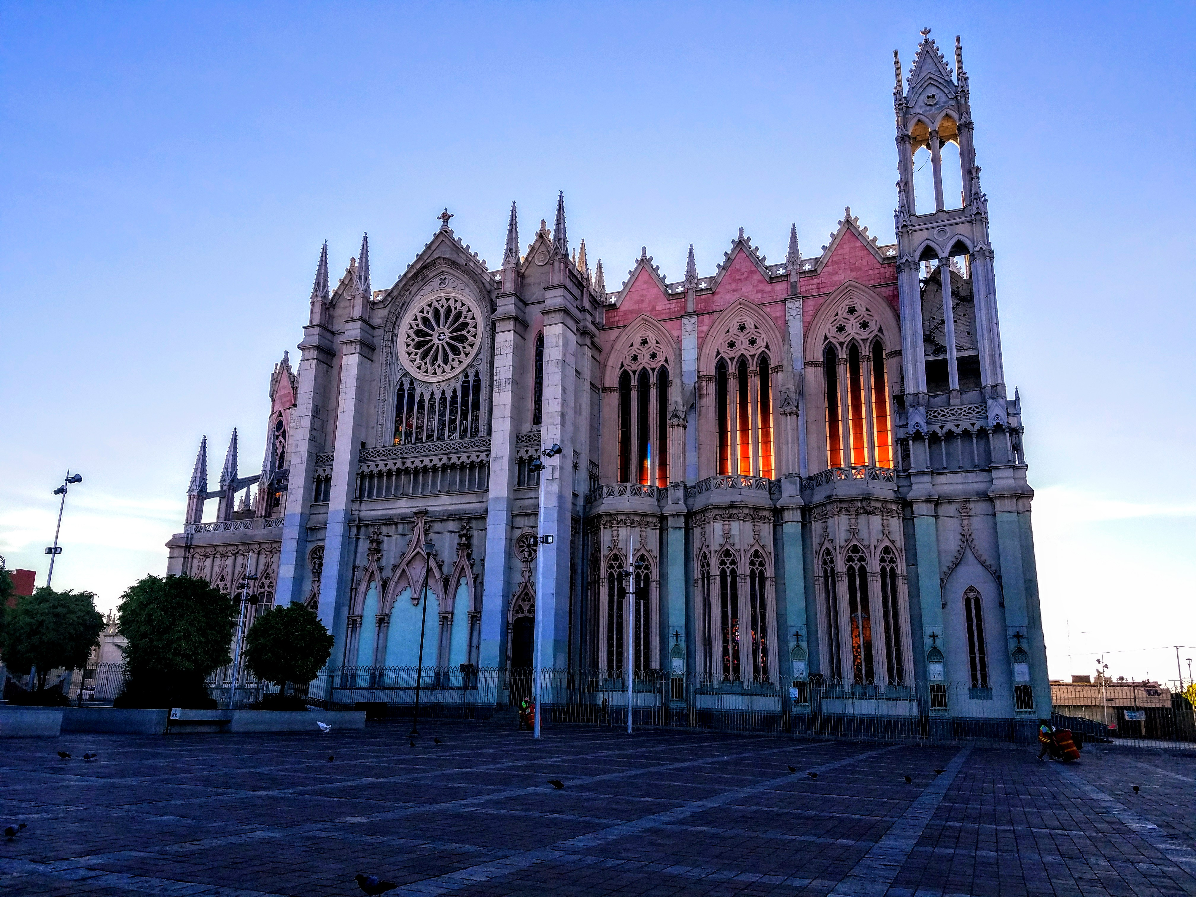 Fachada lateral del Templo Expiatorio